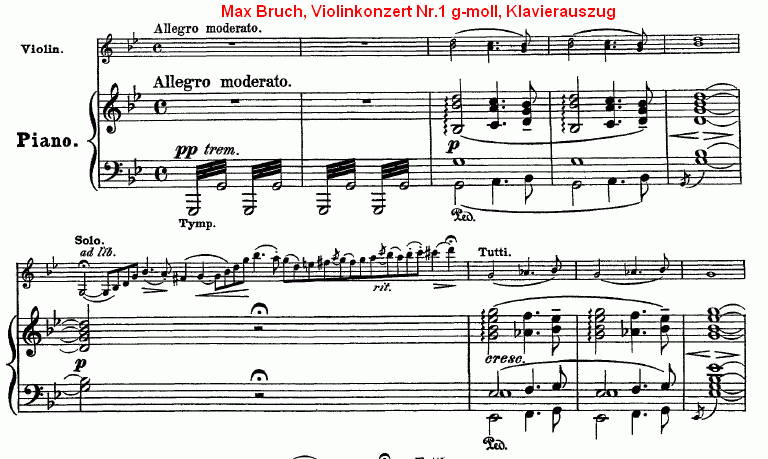 Noten der ersten Tekte des Violinkonzertes von Max Bruch in g-Moll